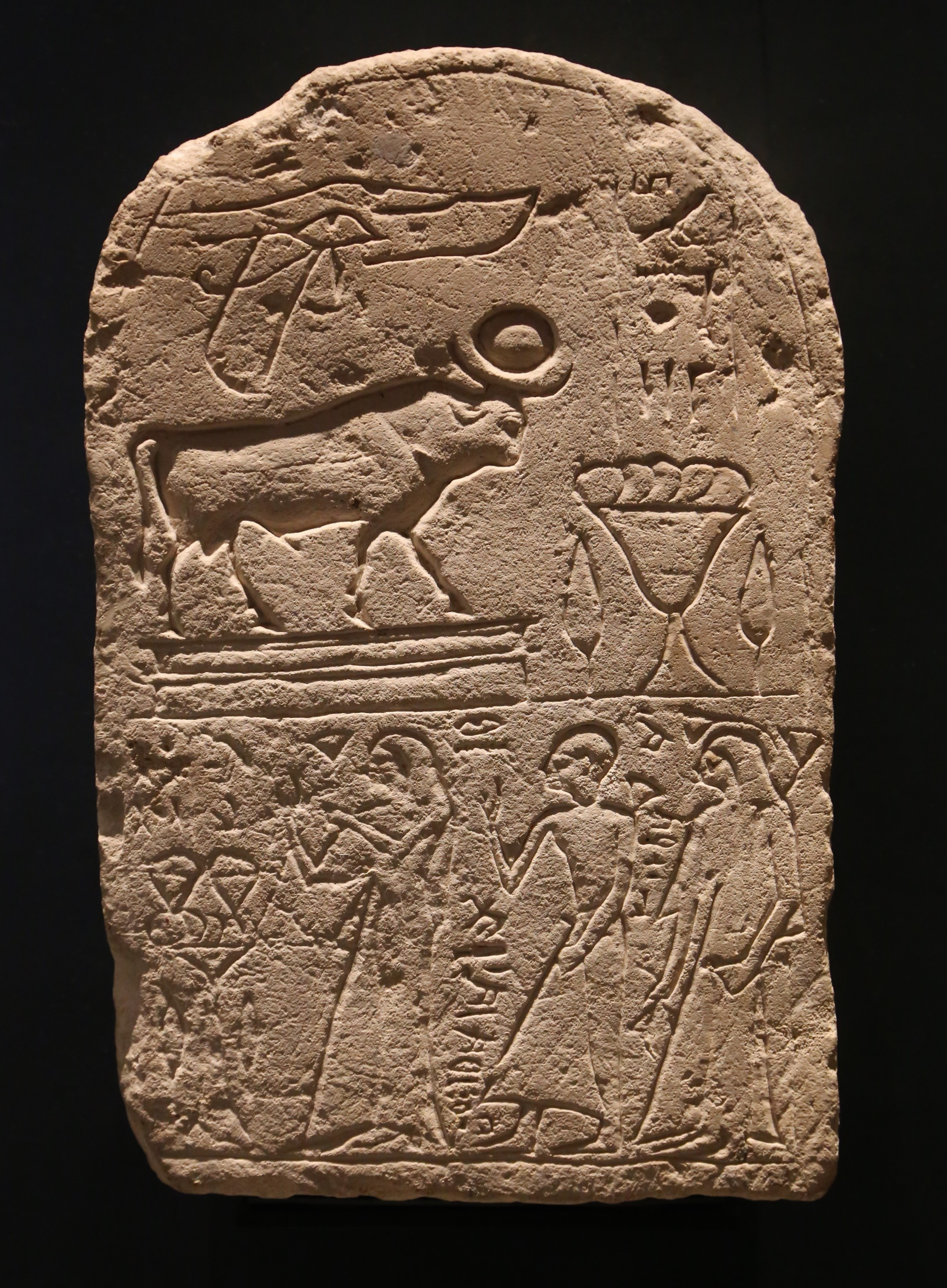 Votivstele für den Mnevis-Stier, Heliopolis, 12. Jh. v. Chr., Kalkstein